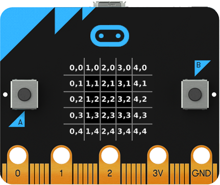 Index x,y des DEL sur la matrice.